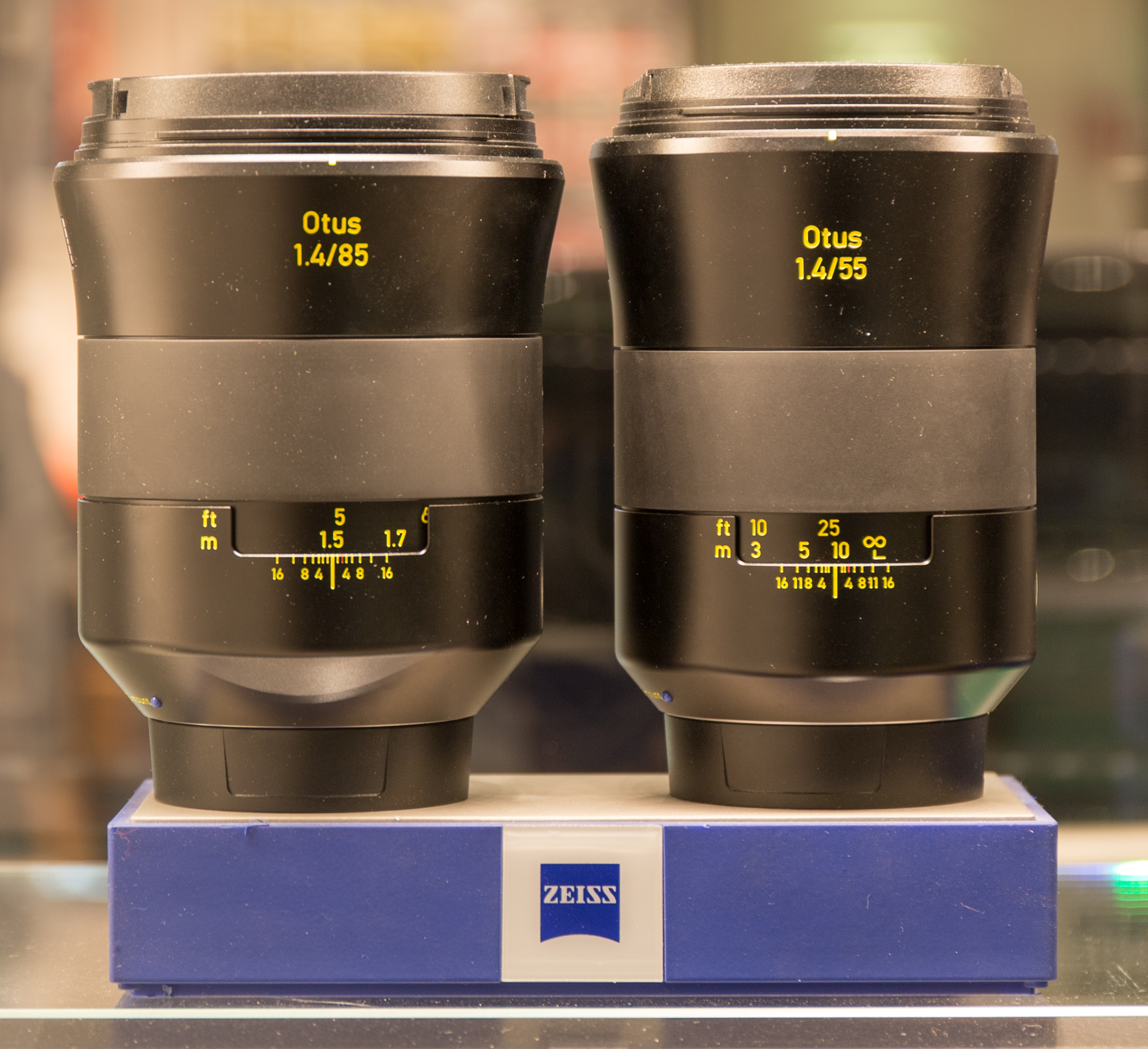 Zeiss Otus Objektive 55mm f1.4 und 85mm f1.4, beide mit Canon EF-Bajonett